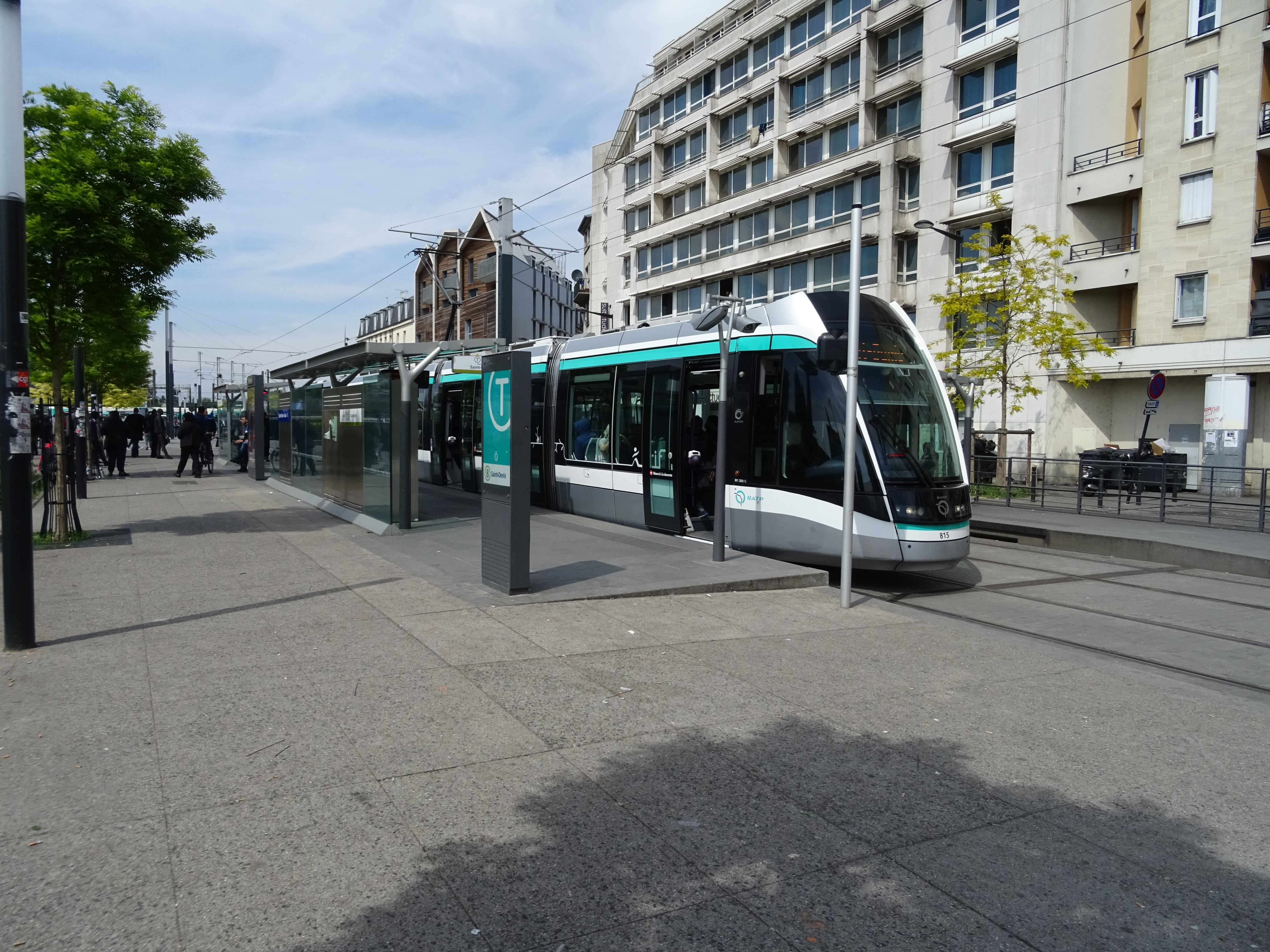 Gare de Saint-Denis arrêt T8